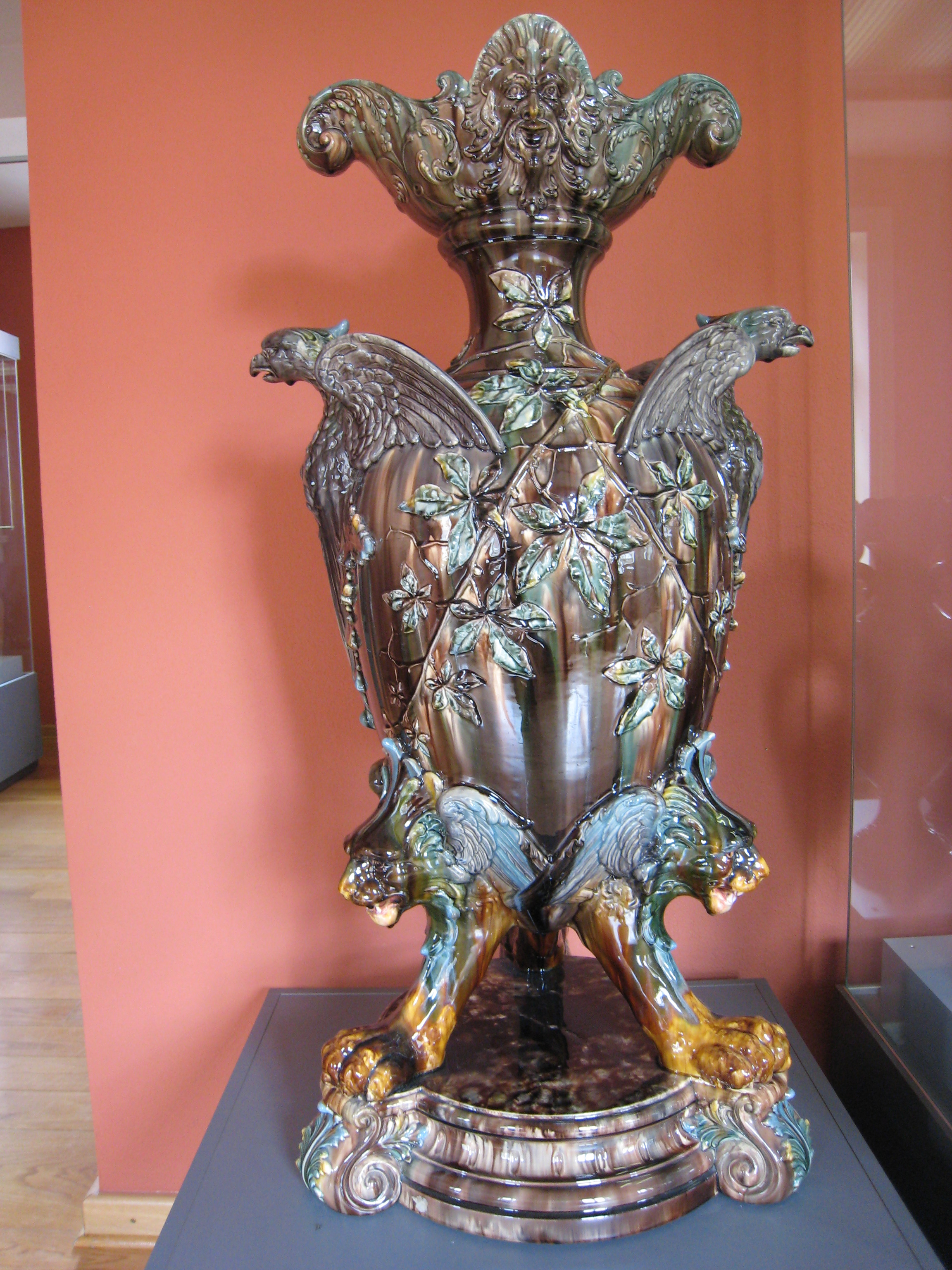 Keramikmuseum Bürgel 3